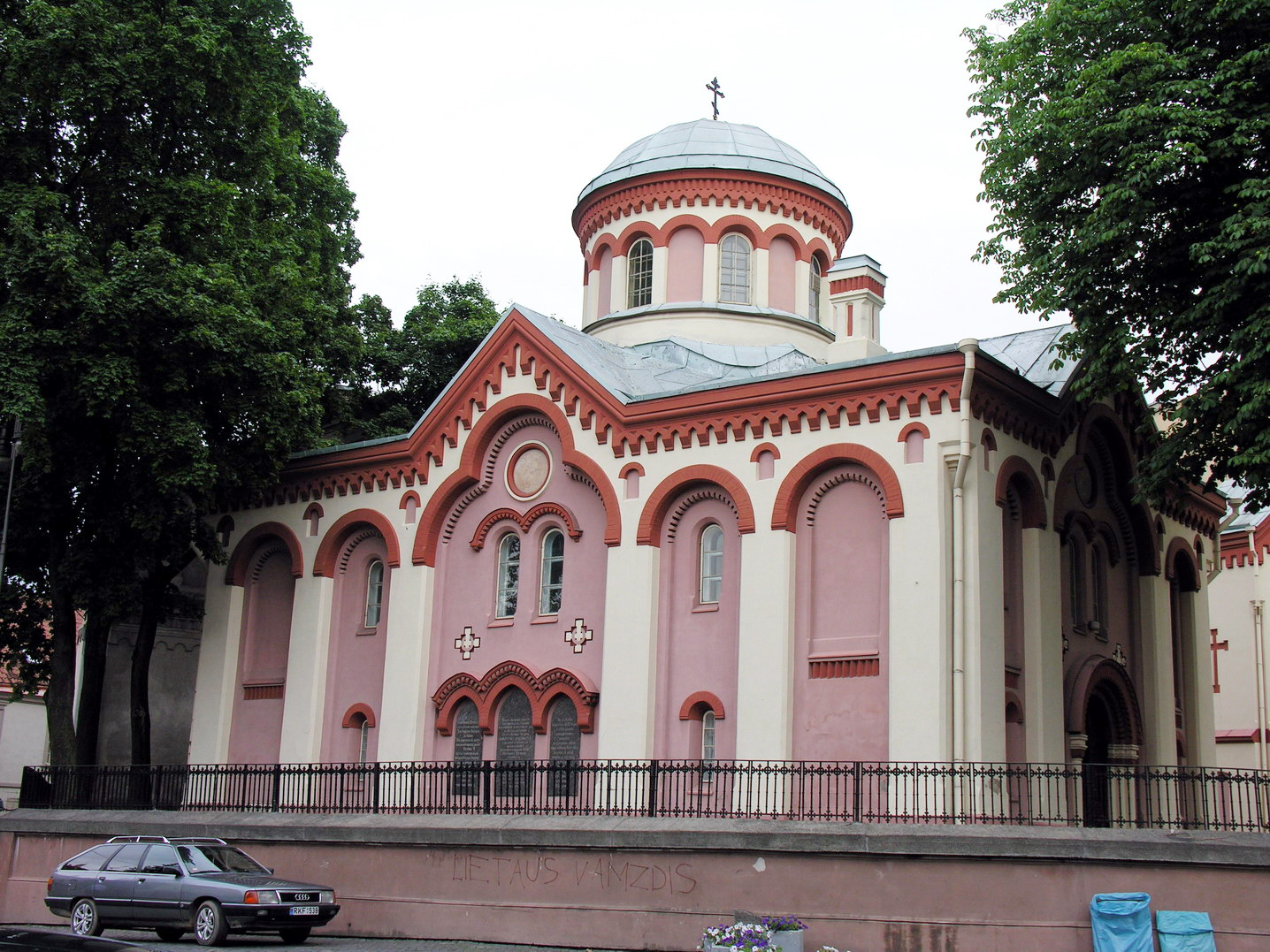 Vilnius Cerkvė Pilies g. Foto: Algirdas, 2006 m. rugpjūčio 8 d., Lietuva